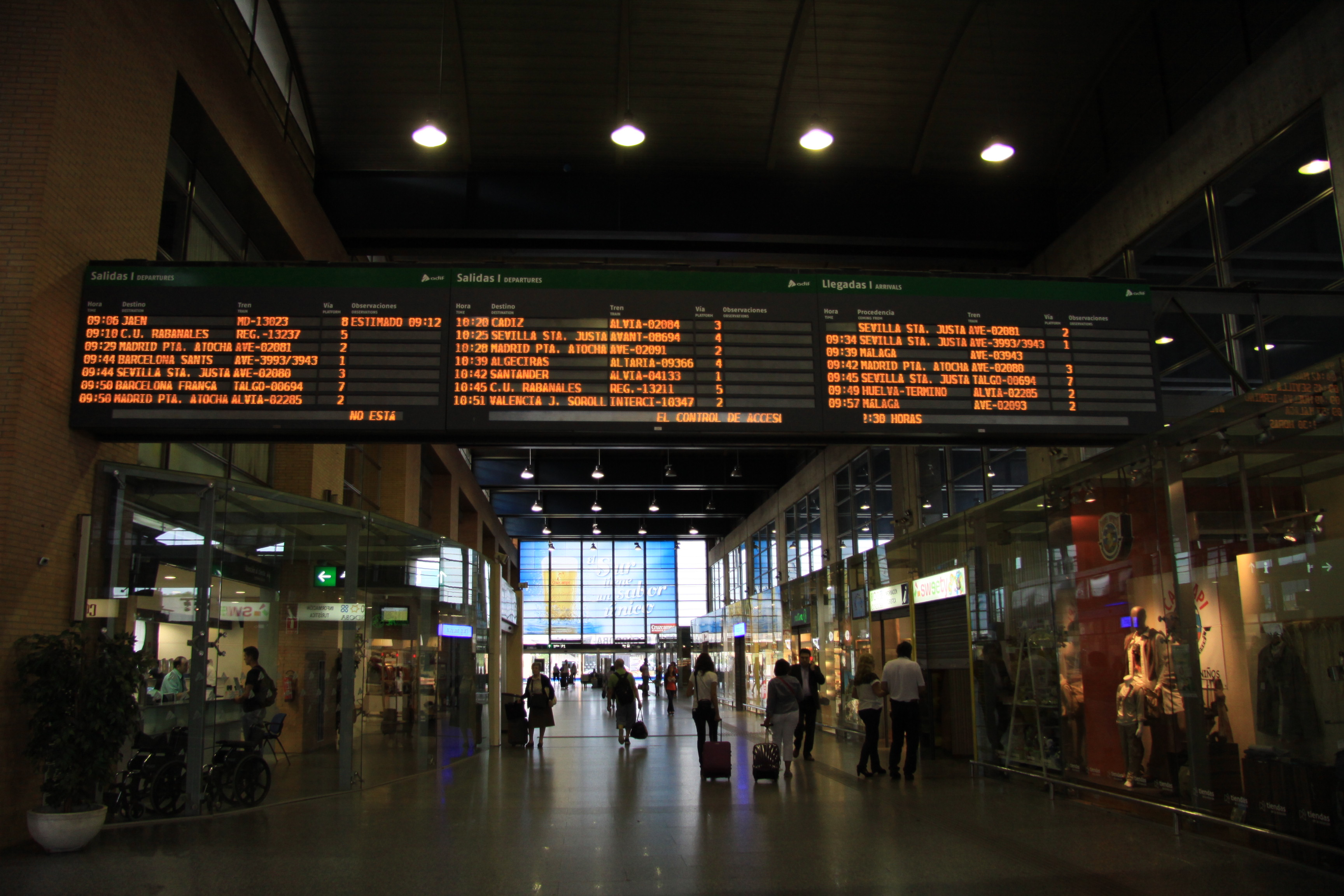 Estación de ferrocarril de Córdoba Central.